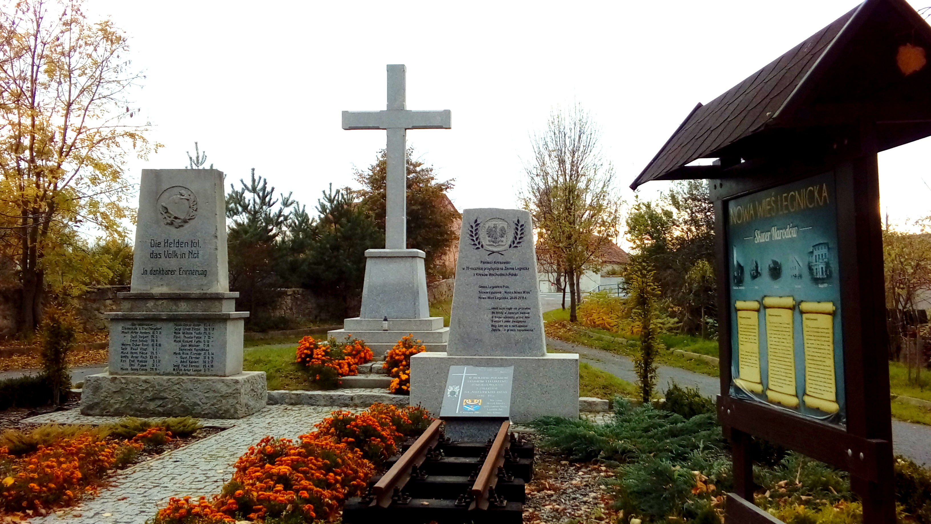 Skwer Narodów w Nowej Wsi Legnickiej